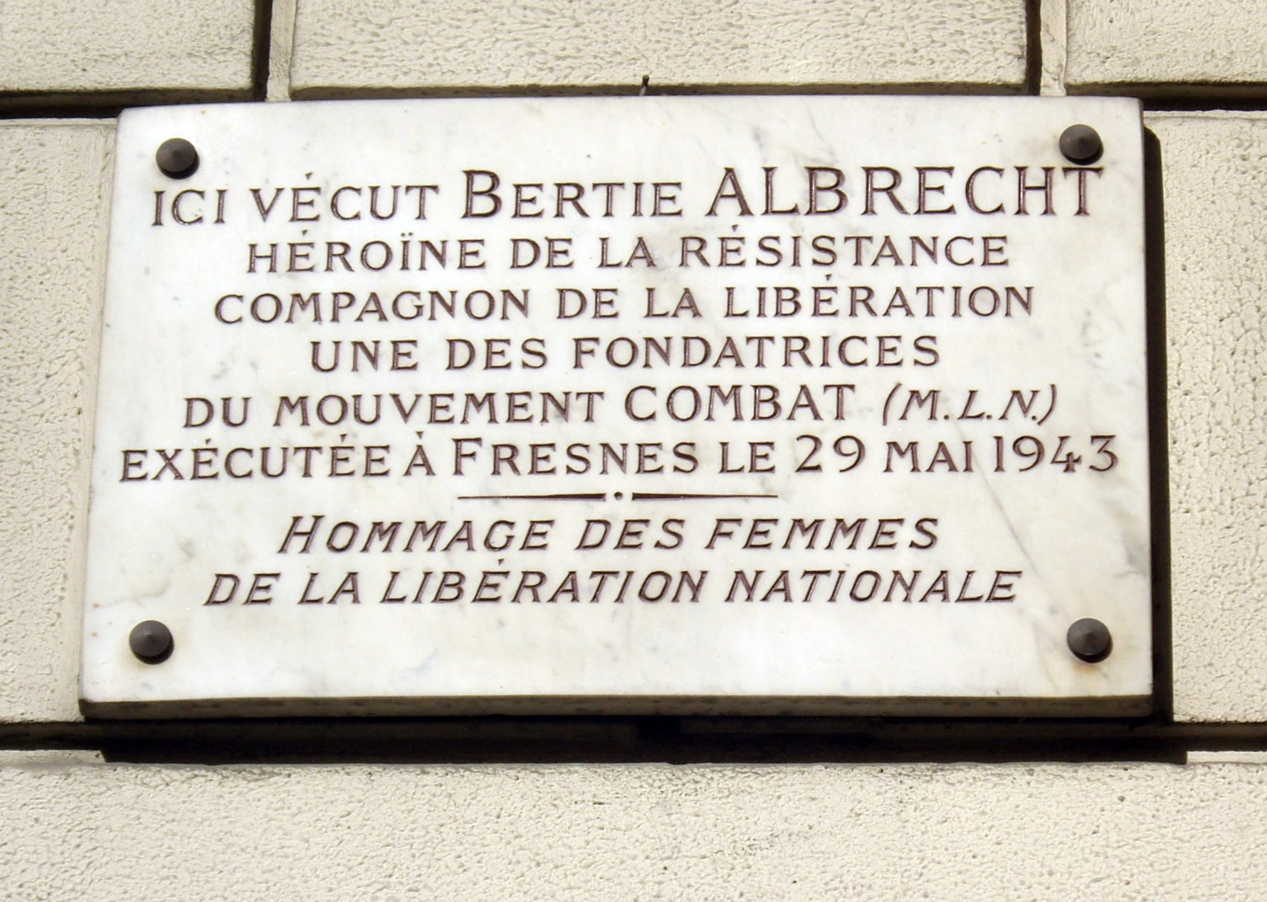 Plaque apposée au n° 16 de la rue de l'Université, Paris 7e, où habita la résistante Berty Albrecht (1893-1943).